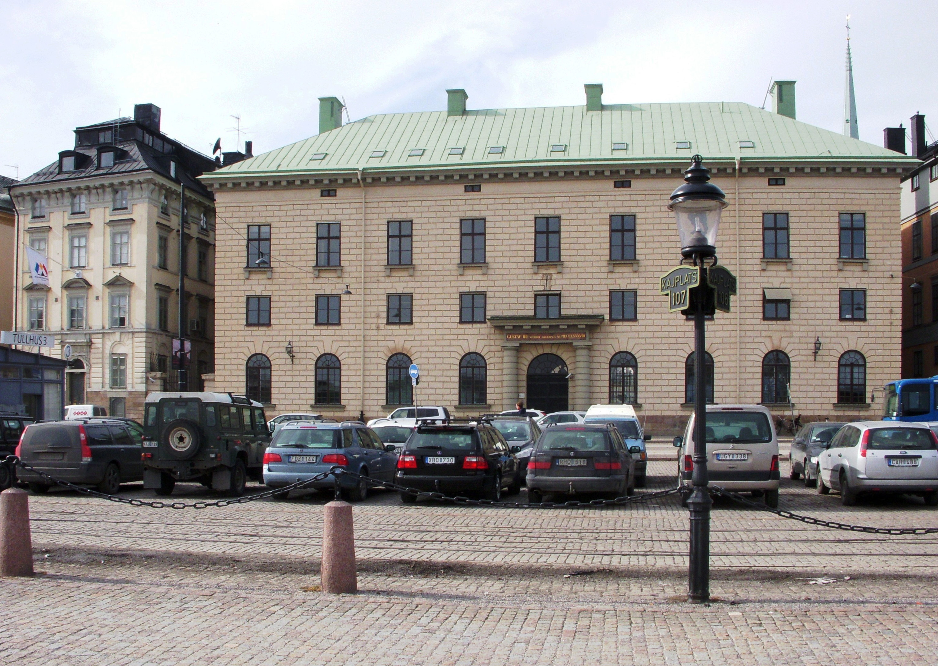 Tullhuset och Küselska huset vid Skeppsbron, Stockholm